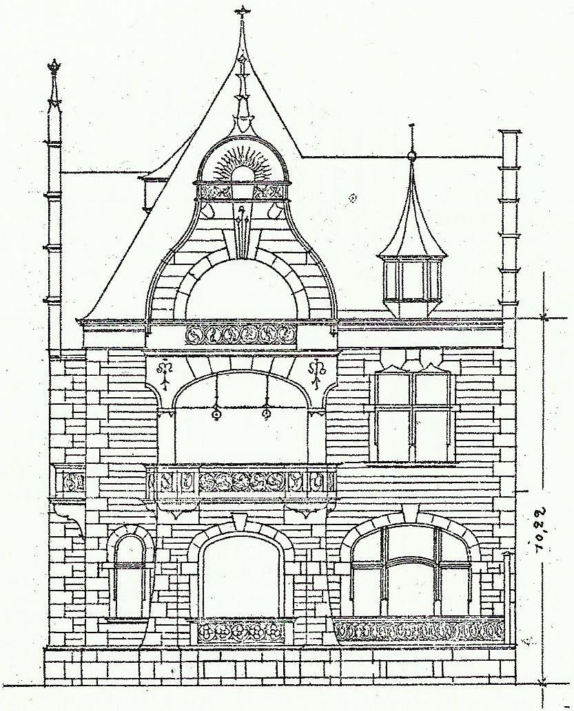 Denkmalgeschützte Villa, Adenauerallee 131, Bonn-Gronau: Plan zum Bauantrag, Aufriss der Straßenfront